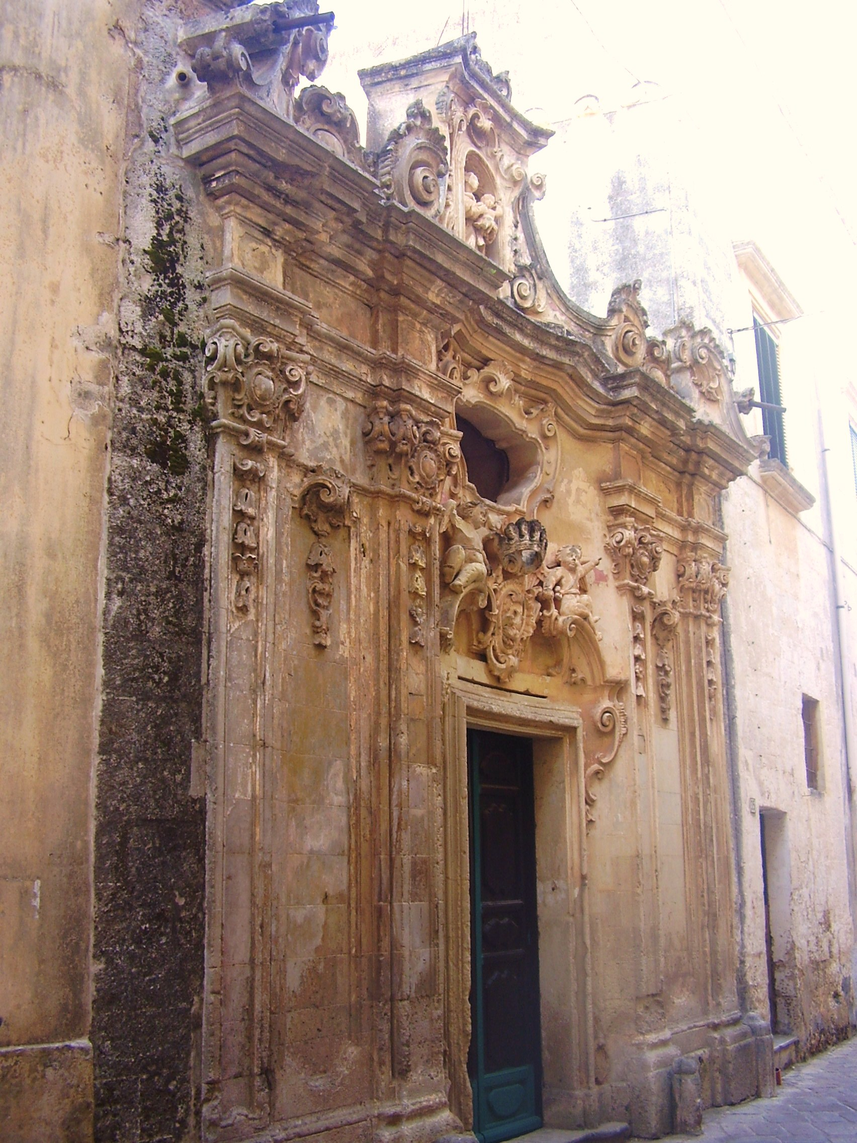 Cappella Arditi Presicce